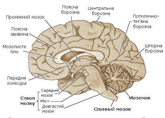 Будова головного мозку